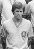 Title: Mannschaftsfoto 1. FC Lok Leipzig Factual corrections and alternative descriptions are encouraged separately from the original description. Additionally errors can be reported at this page to inform the Bundesarchiv. Original historic description: ADN-ZB-Kluge-26.7.78-ma-Leipzig: Die Fußball-Oberligamannschaft des 1. FC Lok Leipzig. Hintere Reihe von links: Thomas Dennstedt, Joachim Fritsche, Günter Sekora, Hans-Jürgen Kinne, Udo Rietzschel, Volker Grossmann und Wolfram Löwe. Mittlere Reihe von links: Trainer Heinz Joerk, Wolfgang Altmann, Karl-Heinz Herrmann, Wilfried Gröbner, Roland Hammer, Henning Frnezel, Mathias Liebers, Lutz Eichhorn, Masseur Helmut Burkhardt und Assistenztrainer Bernd Kirsche. Vorn von links: Andreas Roth, Andreas Bornschein, Rene Müller, Siegfried Stötzner, Werner Friese, Lutz Moldt und Dieter Kühn. (nicht im Bild der Spieler Kreer).